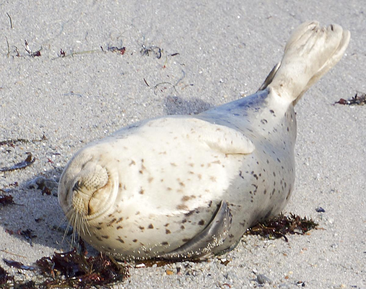 big sur